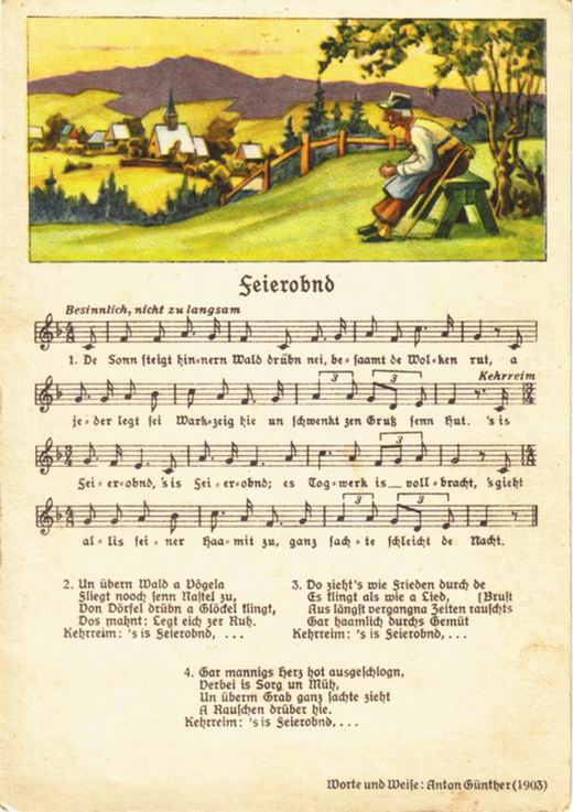 Liedpostkarte von Anton Günther (1876-1937)